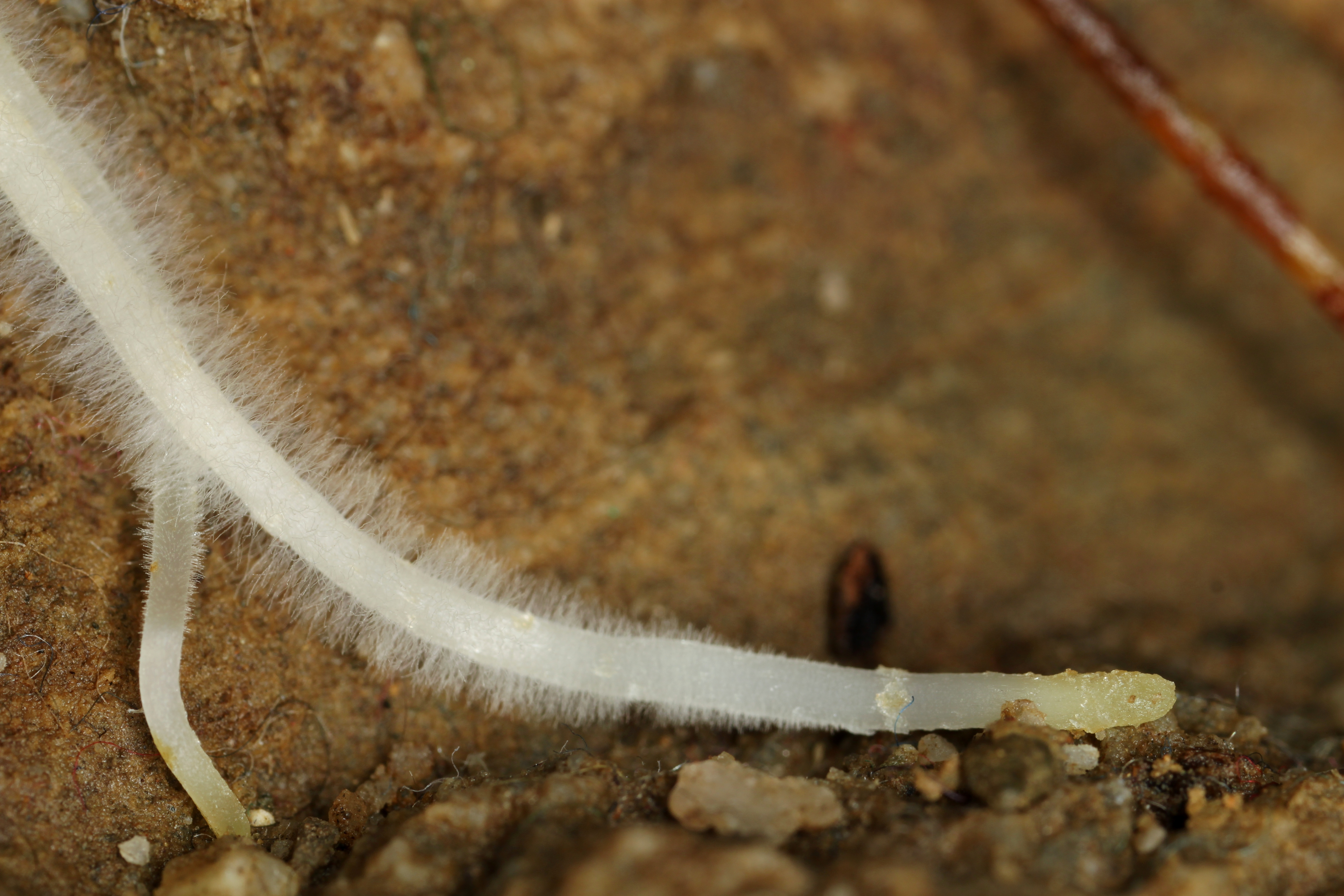 Mycorhizae fungus